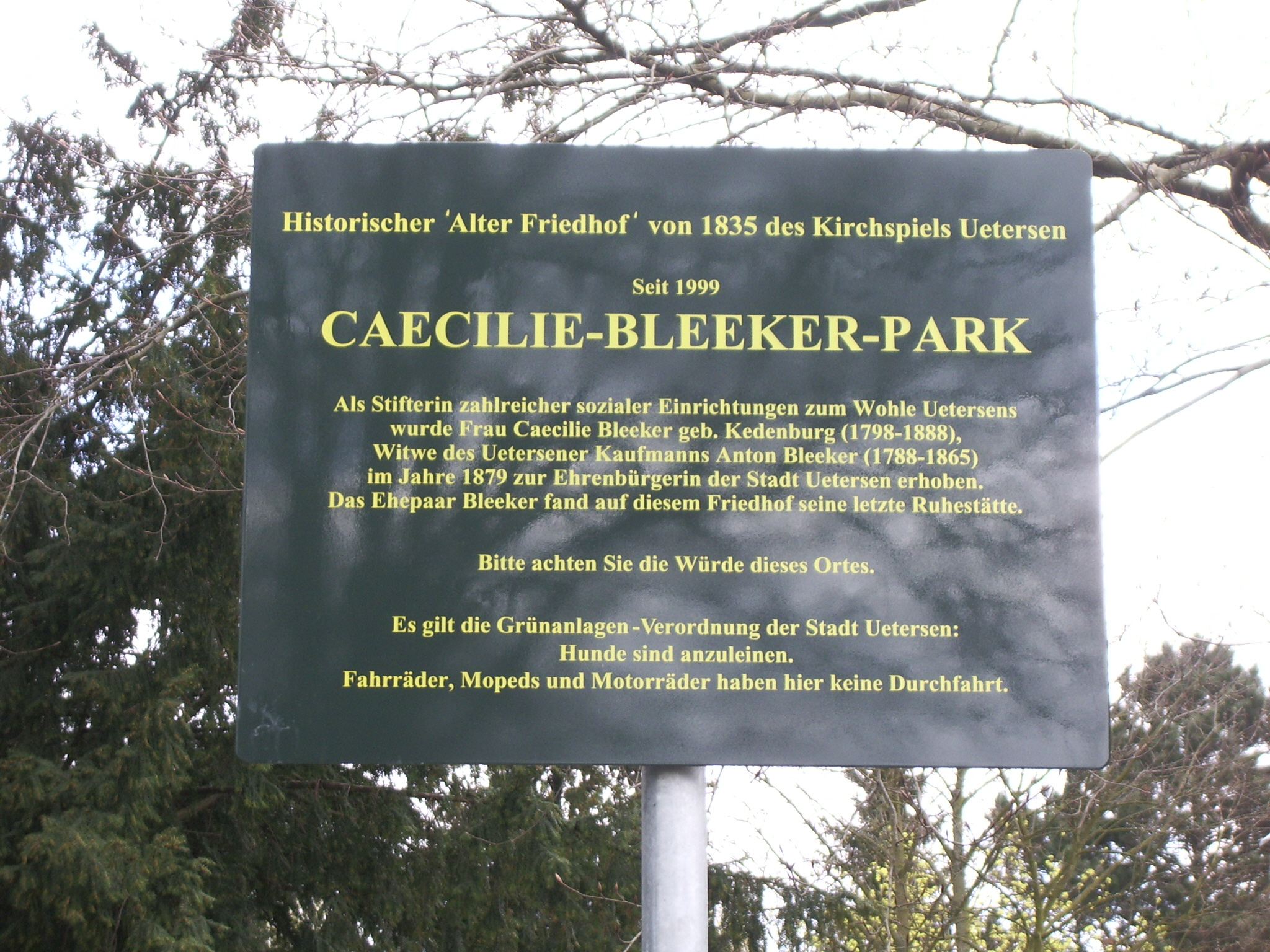 Infoschild Bleeker Park